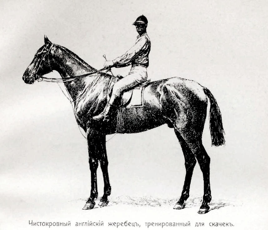 Данное изображение было использовано в статье «Англо-арабская лошадь» опубликованной во втором томе «Военной энциклопедии», который был издан книгоиздательским товариществом Ивана Дмитриевича Сытина в 1911 году в столице Российской империи городе Санкт-Петербурге.